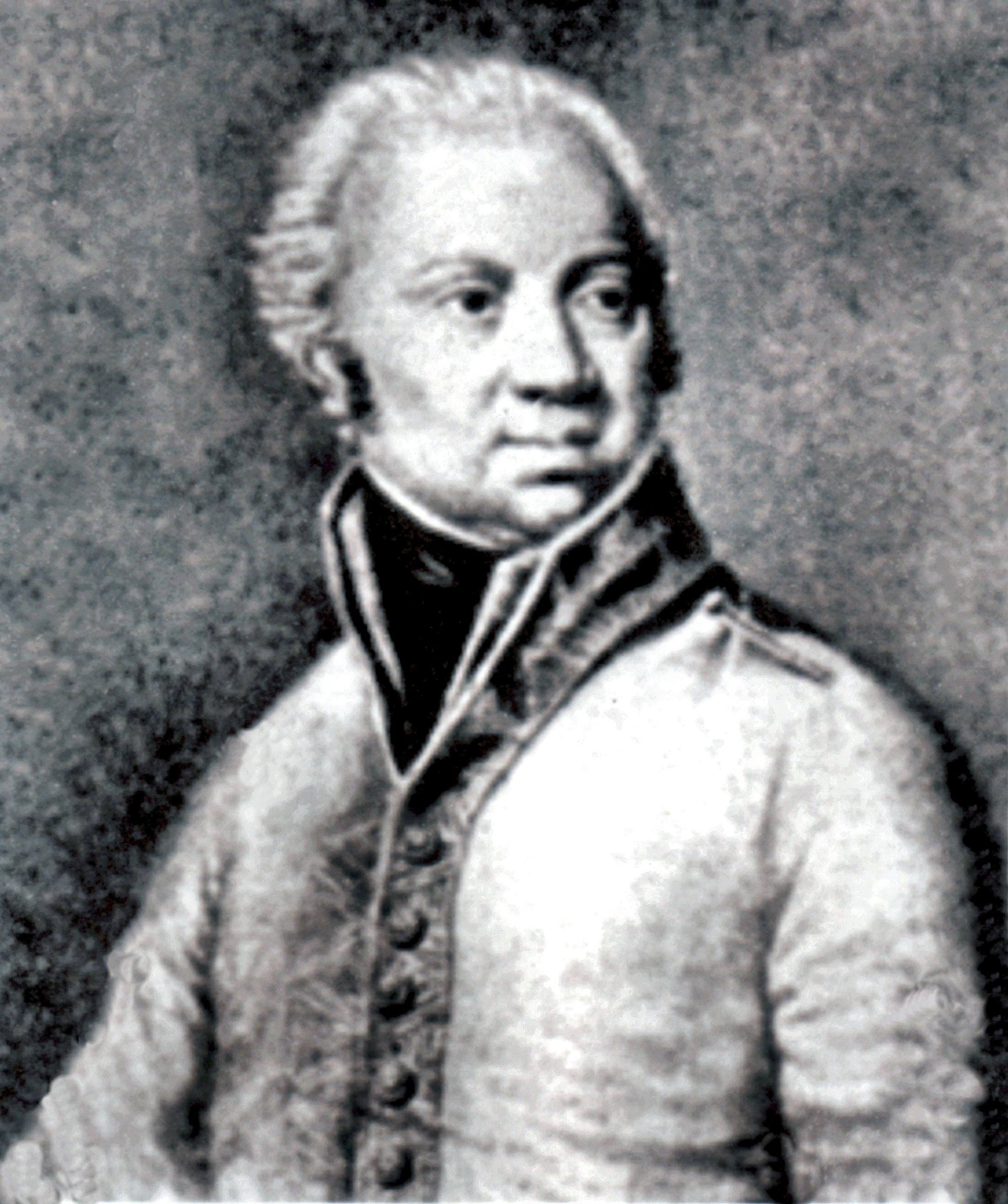 Freiherr Duka von Kádár nach 1801